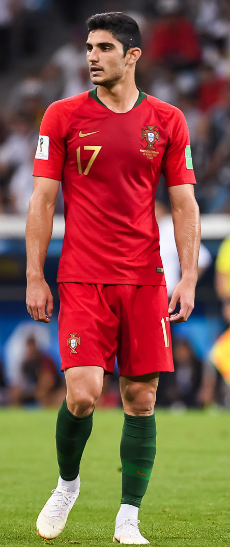 Хет-трик Роналду приносит Португалии ничью в пиренейском дерби